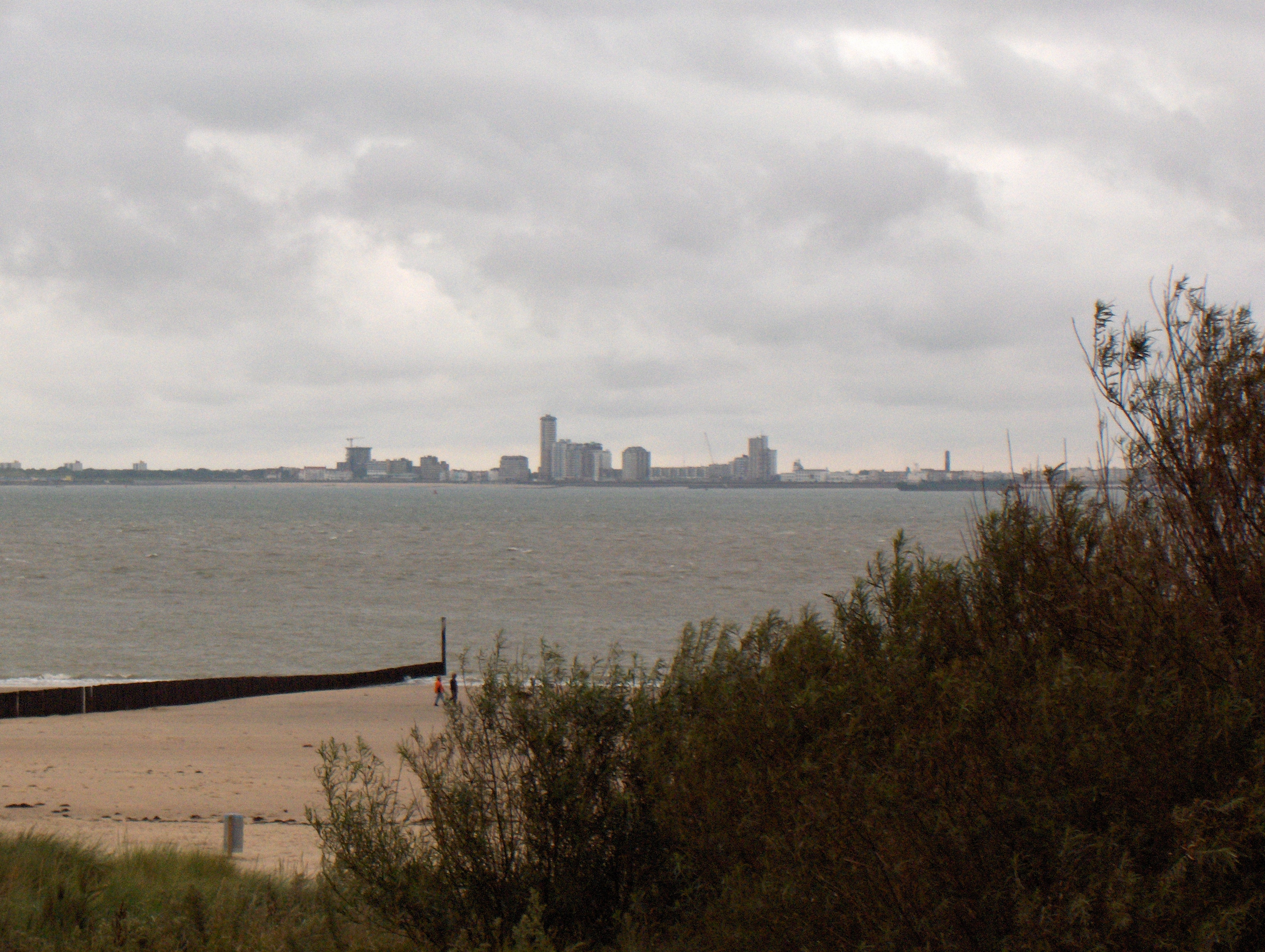 Beschreibung: Breskens (Niederlande), Blick auf die Mündung der Westerschelde in die Nordsee; im Hintergrund die Stadt Vlissingen (Niederlande) Fotograf: Friedrich Tellberg Datum: 20. August 2005